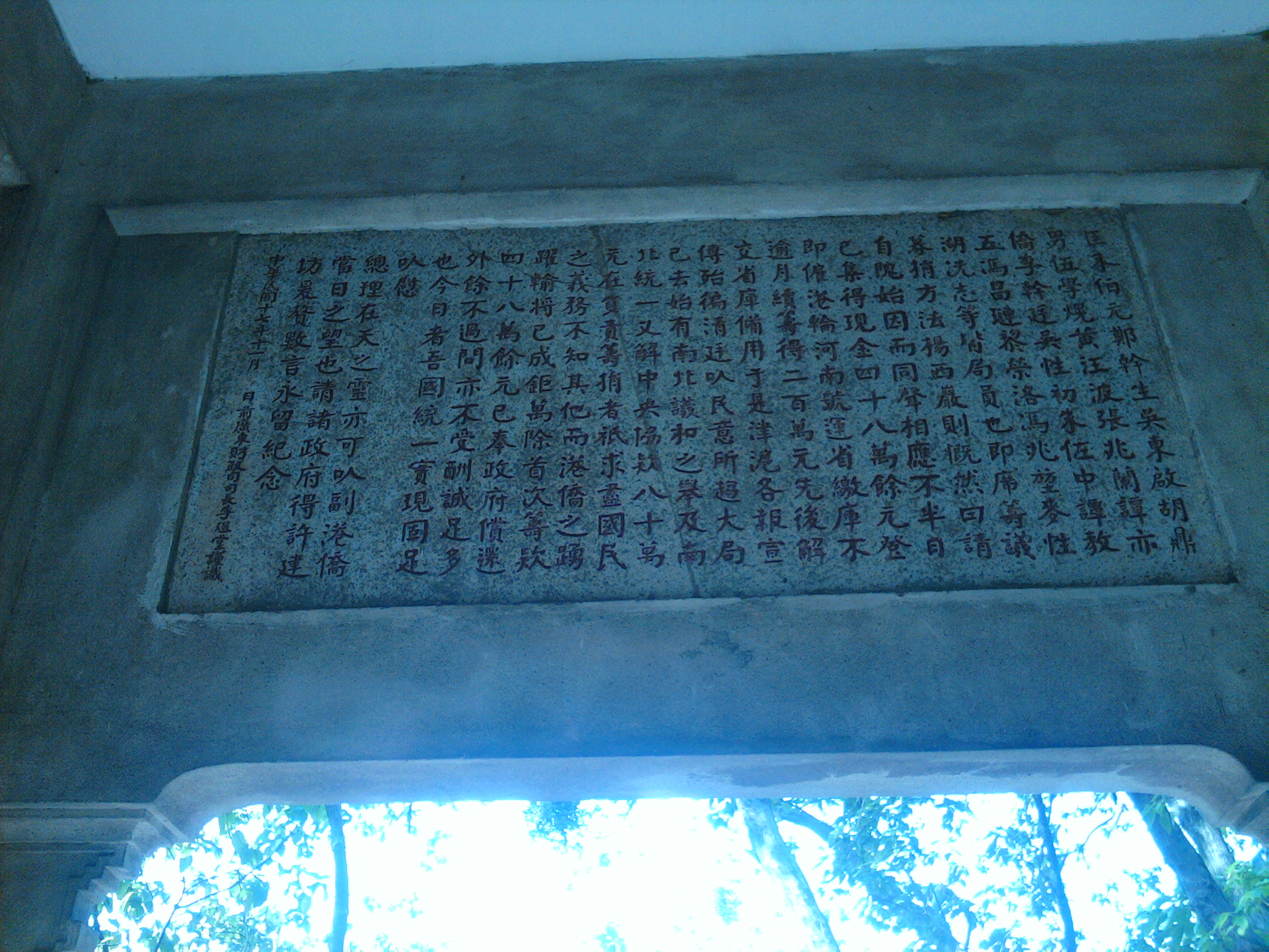 粵秀山上光復紀念石坊跋語 辛亥秋九武昌反正後一月吾粵遂舉義旂（旗），大好河山赫然光復甚盛世也。先是革命同志奉總理孫公命在港組織機闗（關）密謀舉義，粵督張鳴歧聞之聲言獨立㕥（以）圖抵拒，並𣣔（慾）戀棧仍握政權。僑港同志窥（窺）破其奸，於香港會議時楊同志西巖大聲疾呼：㕥（以）張爲殘殺七十二烈士之元𠒋（兇），何可忝任廣東都督。闔座和之。旋推舉港僑三十人與煜堂等隨同胡漢民同志晉省忝與諮議局大會議。港團提出意見，遂一致推戴胡公漢民為都督，宣布獨立。而粵局㕥（已）定時，則義軍雲集，清吏宵遁，庫藏如洗，饟稰告匱。僑港同志爰㕥（以）籌餉爲己任，即趁輪囬（回）港開會於舟中決議在香港設籌餉局，並公推楊西巖為正主席，鄧仲澤副之，林護、歐彬為司庫，余斌臣、伍耀庭爲司理，譚煥堂為參謀，餘如譚肇康、伍于簪、李文啟、姚樂臣、朱伯元、鄭幹生、吳東啟、胡鼎男、伍學熀、黃汪波、張兆蘭、譚亦僑、李幹廷、吳性初、朱佐中、譚教五、馮昌璉、黎榮洛、馮兆堃、麥性湖、冼志等皆局員也。即席籌議募捐方法，楊西巖則慨然曰，請自隗始。因而同聲相應，不半日已集得現金四十八萬餘元，登即僱港輪河南號運省繳庫。不逾月續籌得二百萬元先後解交省庫備用，于（於）是津滬各報宣傳殆徧（遍）。清廷㕥（以）民意所趨，大局已去，始有南北議和之舉。及南北統一，又解中央協欵（款）八十萬元。在負責籌捐者祇（只）求盡國民之義務，不知其他。而港僑之踊躍輸將已成鉅萬。除首次籌欵（款）四十八萬餘元已奉政府償還外，餘不過問，亦不受酬，誠足多也。今日者吾國統一實現固足㕥（以）慰。總理在天之靈亦可㕥（以）副港僑當日之望也。請諸政府得許建坊，爰贅數言永留紀念。 中華民國十七年十一月 日前廣東財政司司長李煜堂謹識